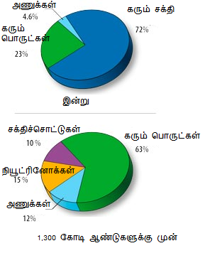 அண்டவியல் this image copied from en.wiki and edited by me. அனுமதி பகுப்பு:தமிழில் விளக்க வரைபடங்கள்